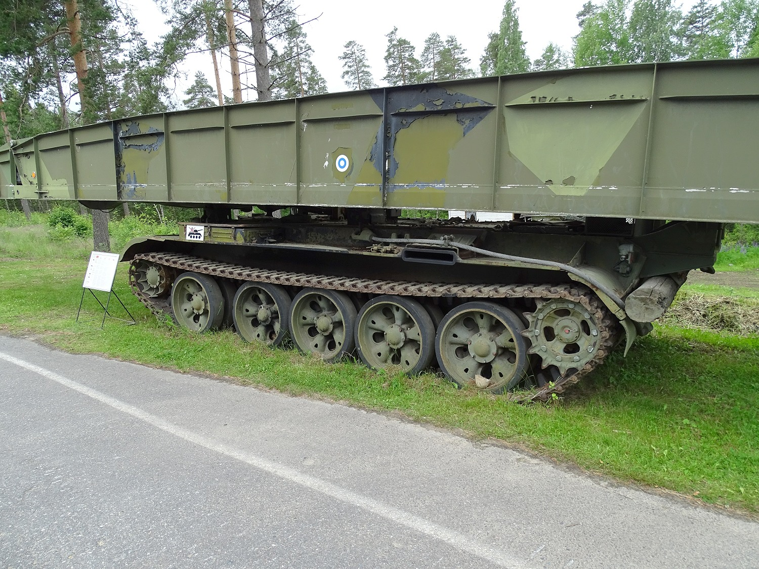 194 - T-55 MTU-20